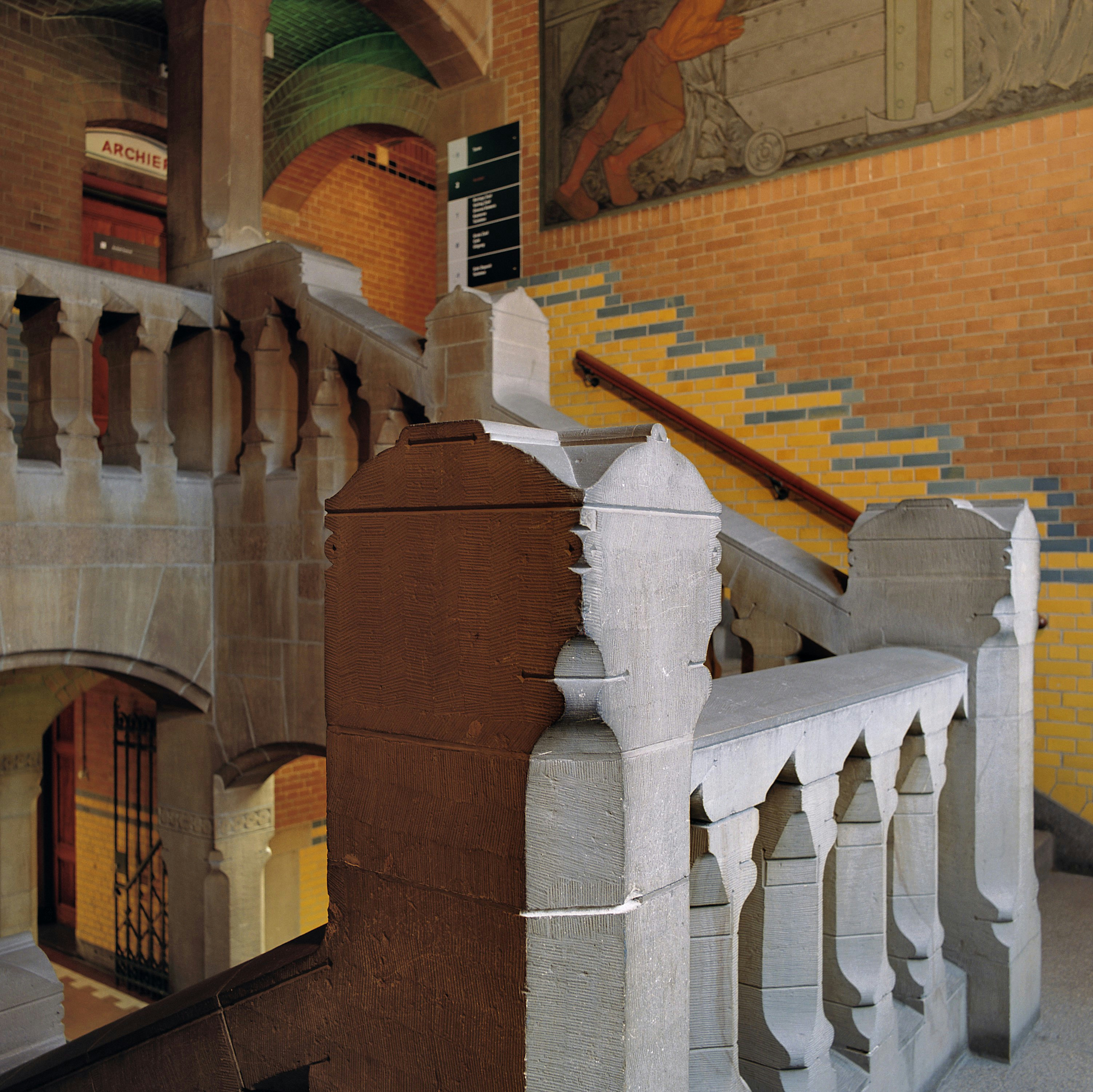 Beurs van Berlage: Interieur, trappenhuis (opmerking: Boek: "66 Kanjermonumenten")